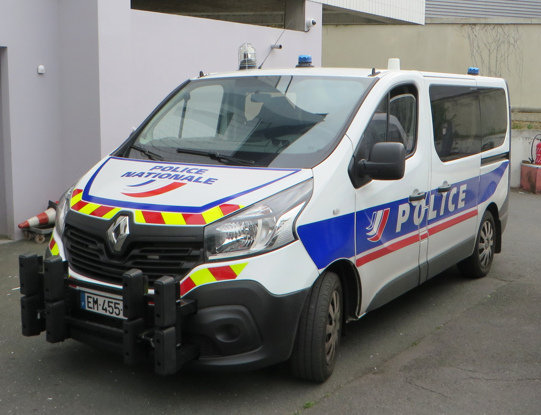 Franse politie (Police Nationale)